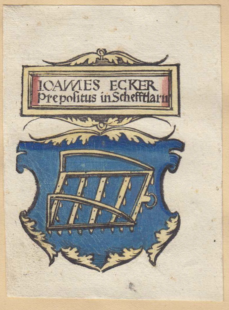 Ex libris, Kloster Schäftlarn, Propst Johannes Ecker (1544–1556)